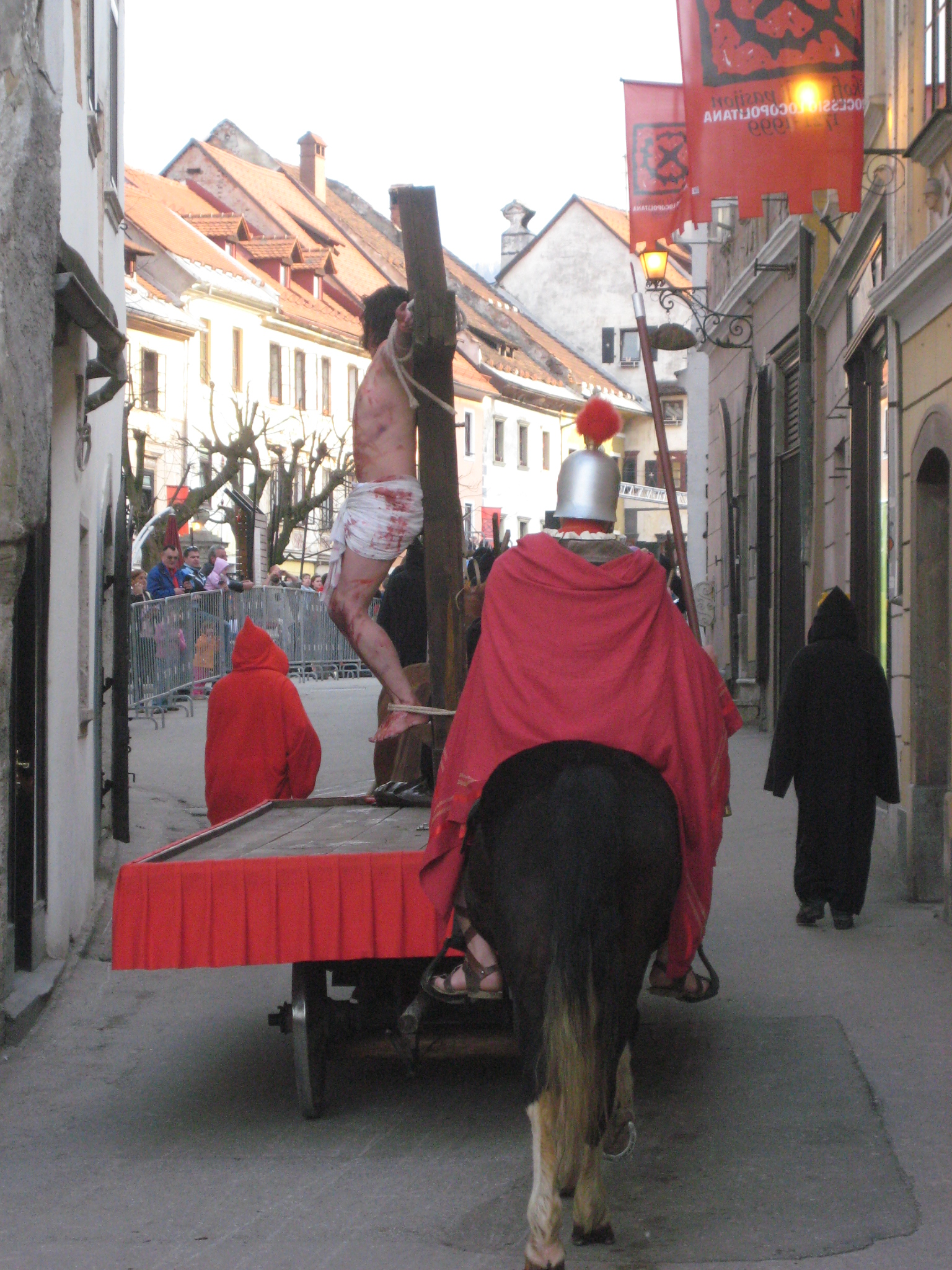 Škofjeloški pasijon (Processio Locopolitana), izvedba 2009 v Škofji Loki